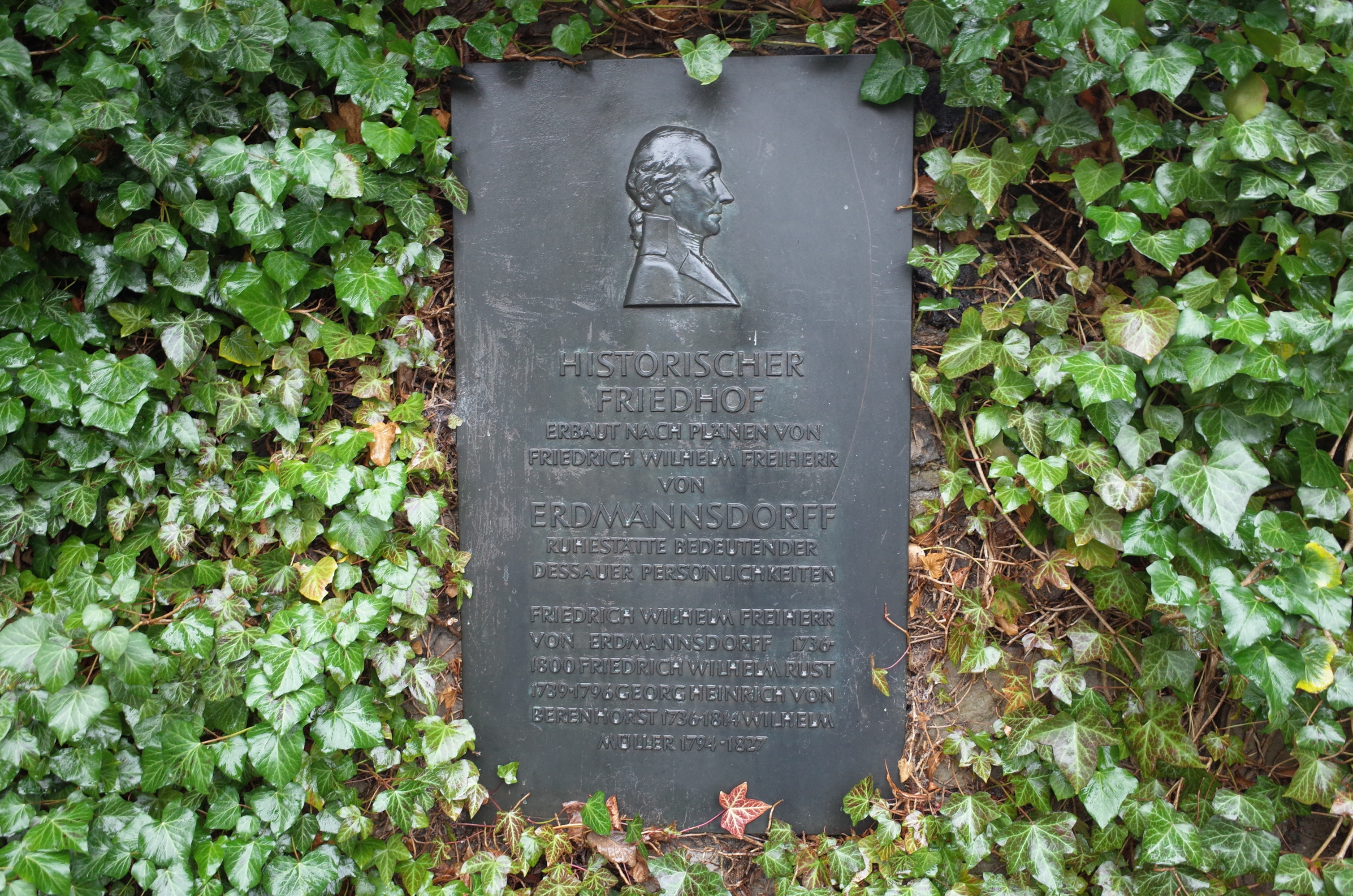 Dessau, Gedenktafel für Friedrich Wilhelm Freiherr von Erdmannsdorff am Historischen Friedhof (Neuer Begräbnisplatz).